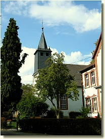 Kirche & Alte Schule bis 1969 - Heute Dorfgemeinschaftshaus